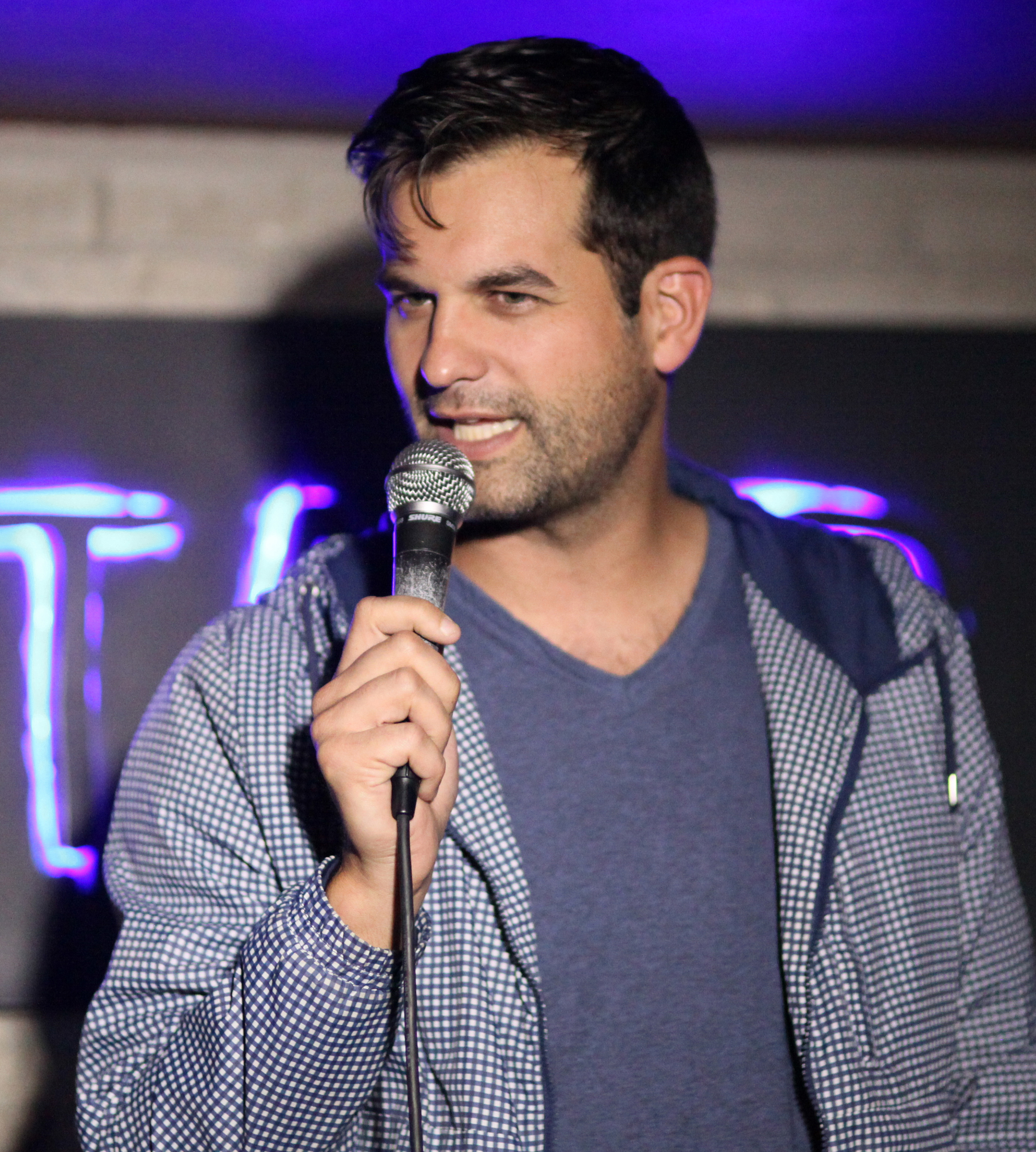 Kosta in June 2017.